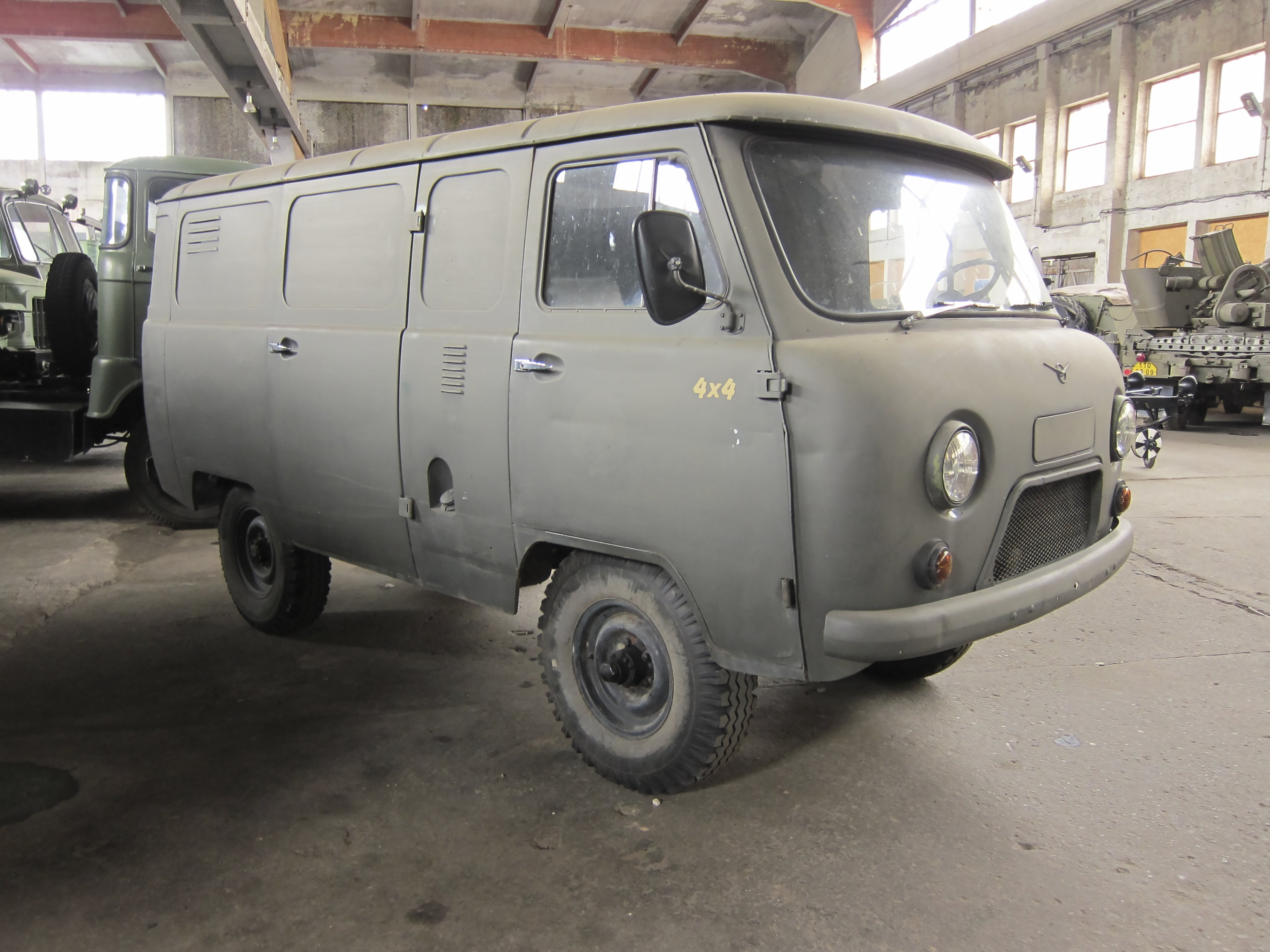 Technik Museum Pütnitz